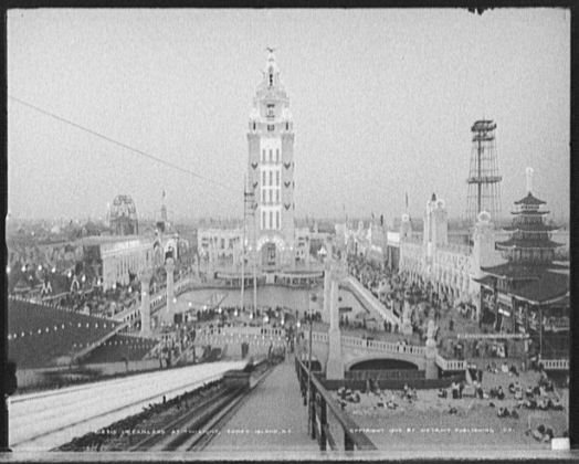 Dreamland-Vergnügungspark vom „Shoot-the-Chutes“ aus gesehen. Rechts neben der zentralen Lagune das japanische Teehaus, dahinter die Fassade von „Fighting-the-Flames“. Im Hintergrund sind rechts Andrew Culvers Aussichtsturm mit Dampfaufzug und links das „Wonder Wheel“-Riesenrad von Tilyou zu erkennen. Rechts im Vordergrund liegt der Badestrand.